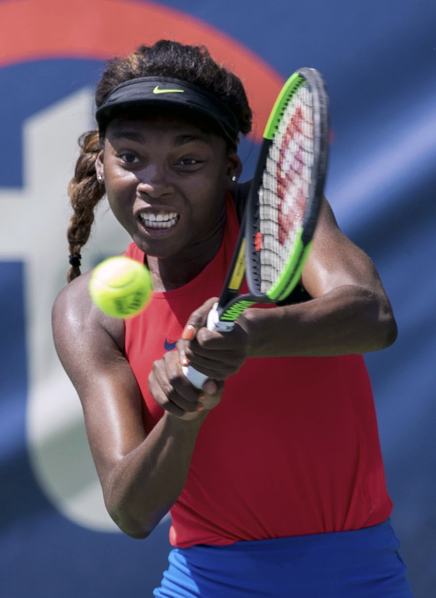 Citi Open Tennis 2017